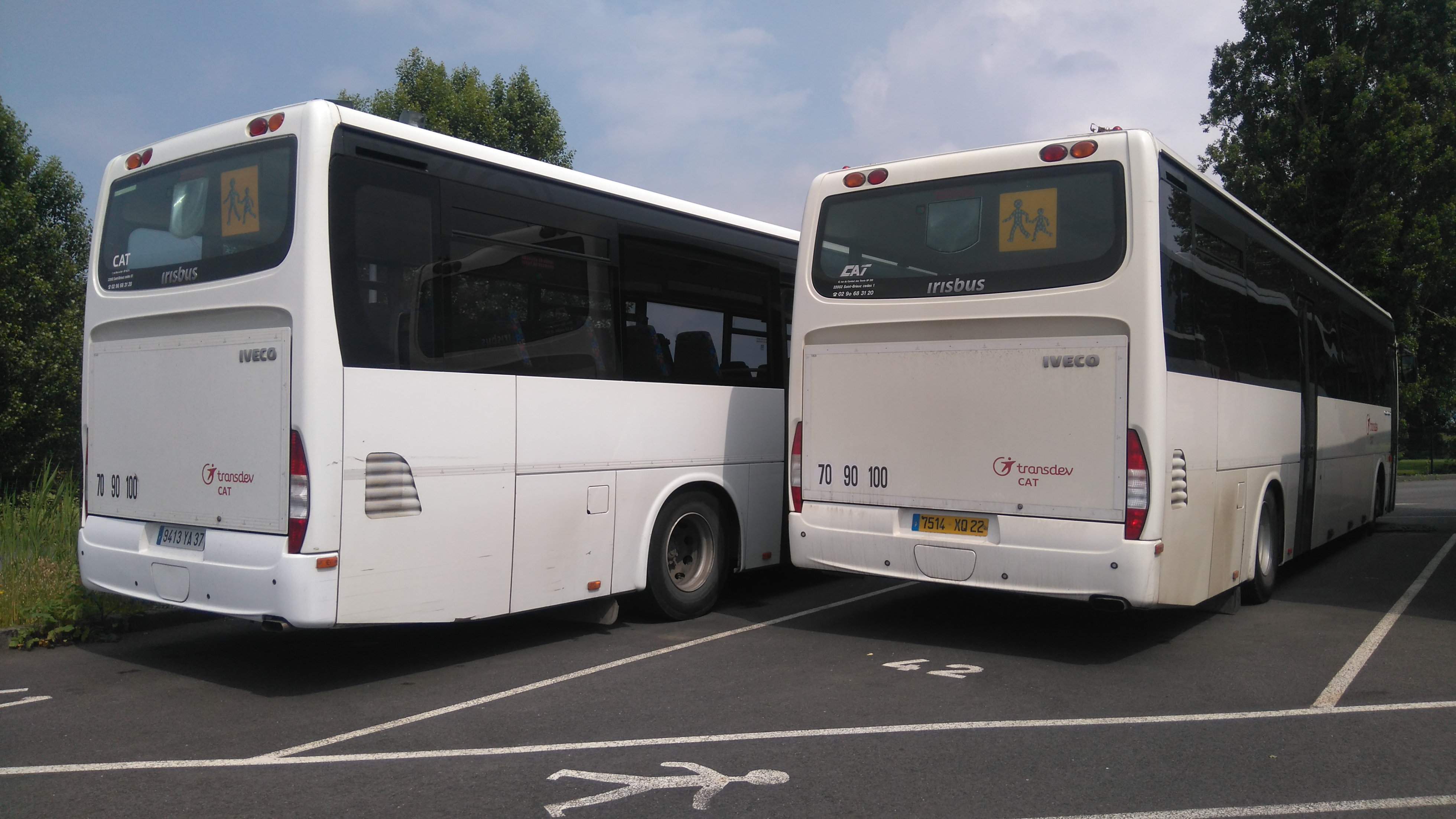 Irisbus New Récréo 12.8m (2006)